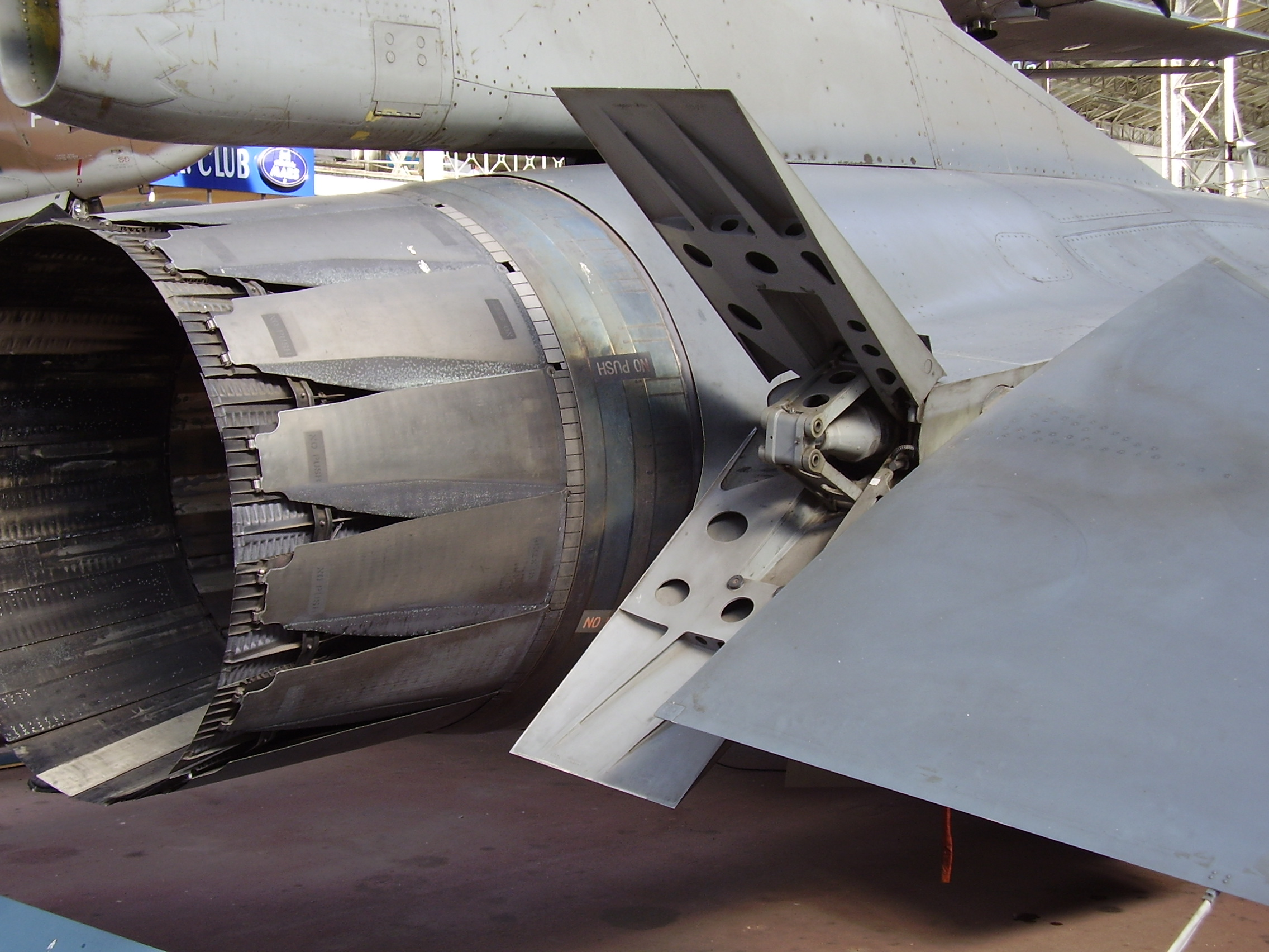 Royal Military Museum Brussels, Musée Royal de l'Armée, Koninklijk Museum van het Leger en de Krijgsgeschiedenis